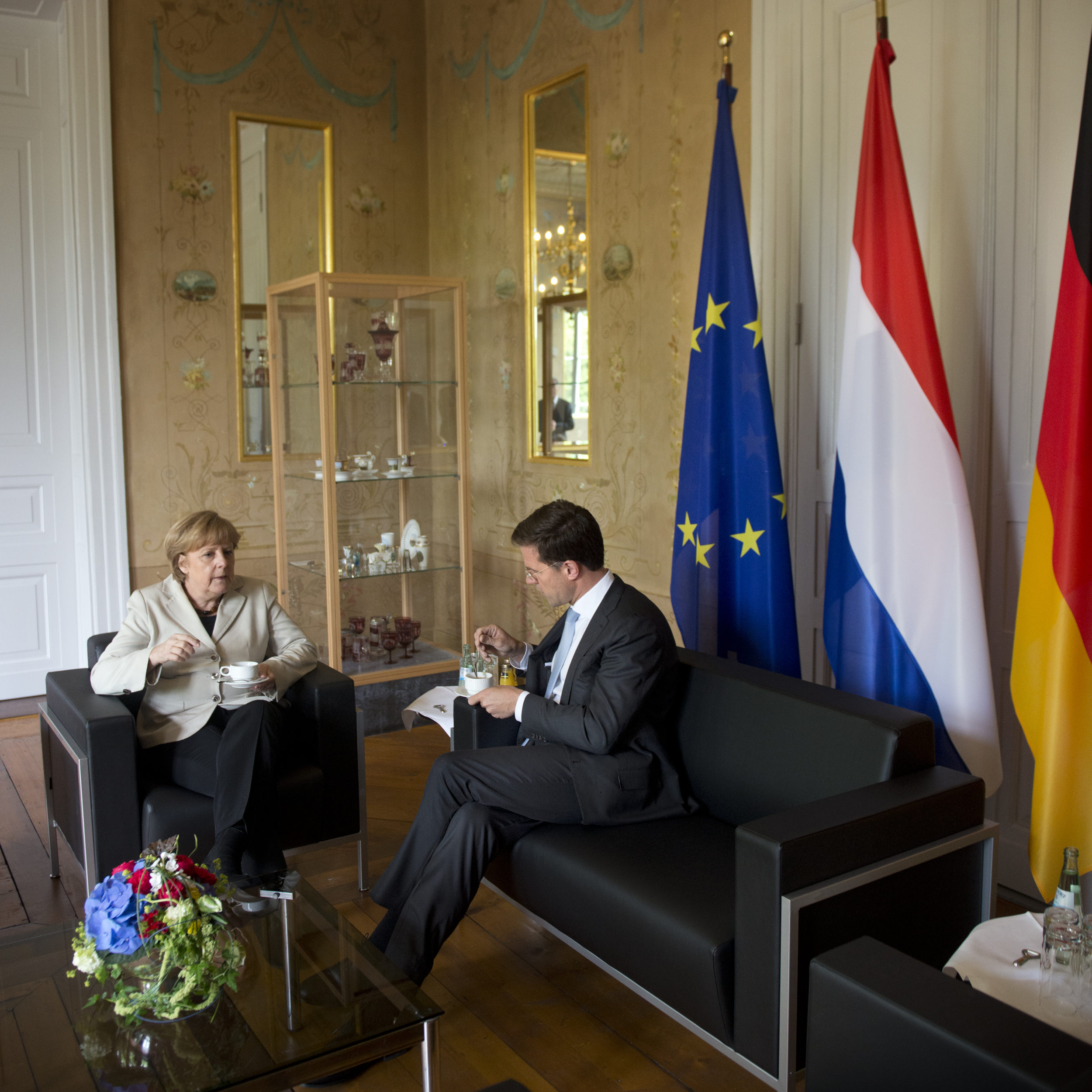 Voorafgaand aan het Nederlands-Duitse regeringsoverleg, op 23 mei 2013 in Museum Kurhaus Kleve, hebben premier Rutte en Bondskanselier Merkel een bilateraal gesprek.